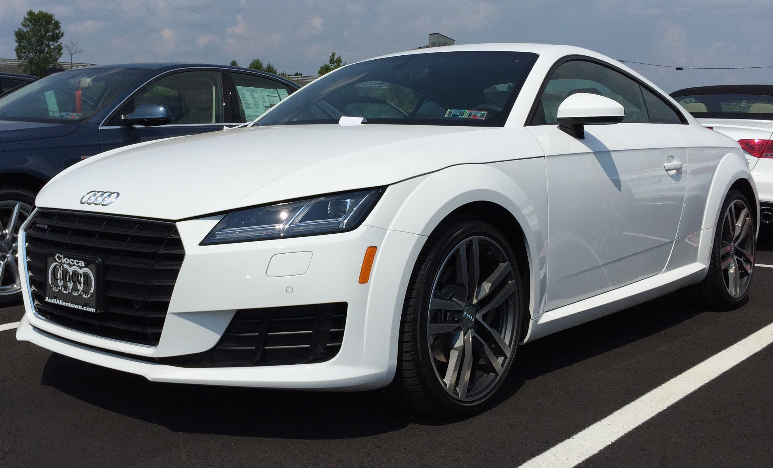 Audi TT